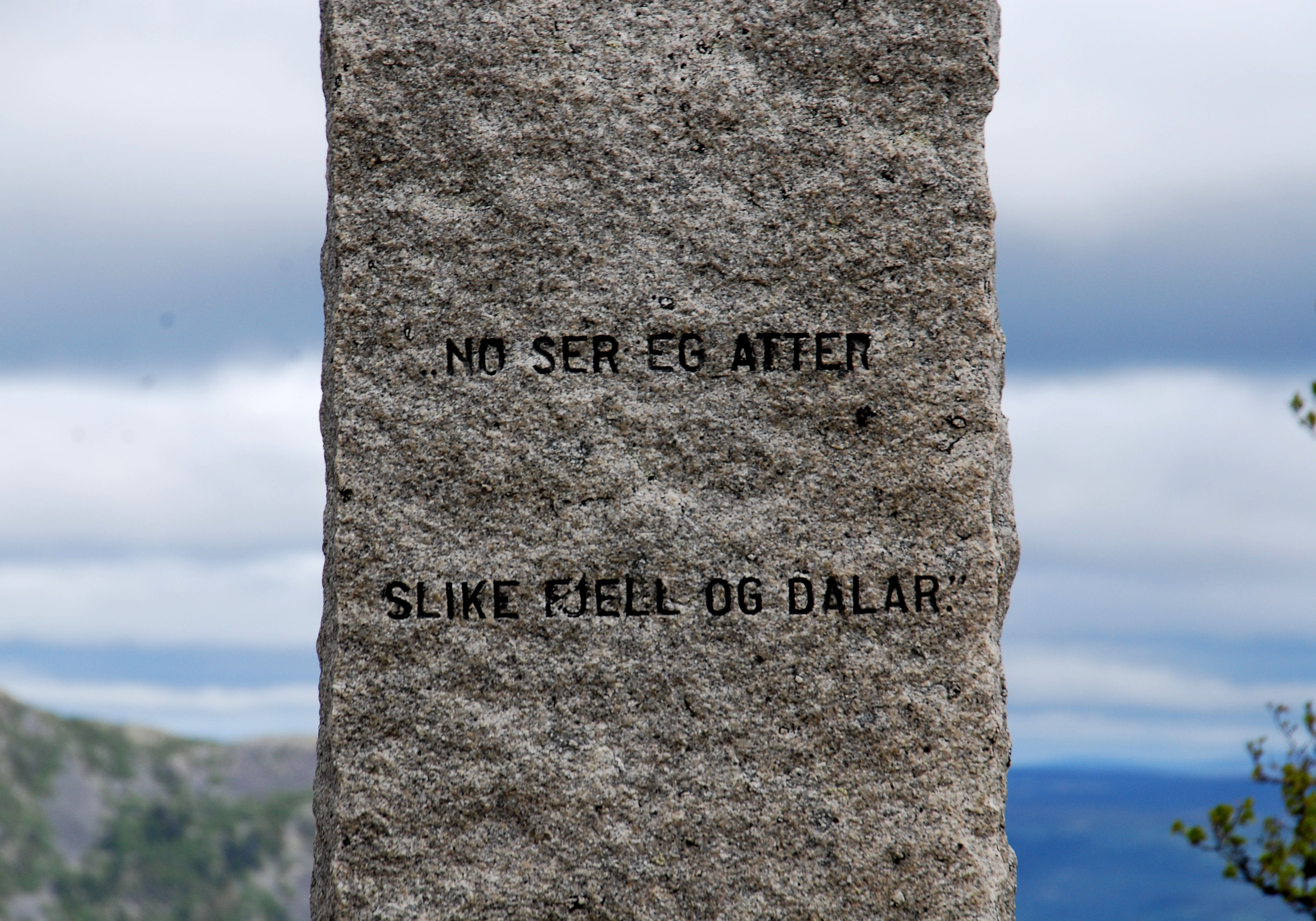 Vinjestøtta. Står langs Vinjevegen i Stor-Elvdal kommune i Hedmark. Tekst: «No ser eg atter slike fjell og dalar.»